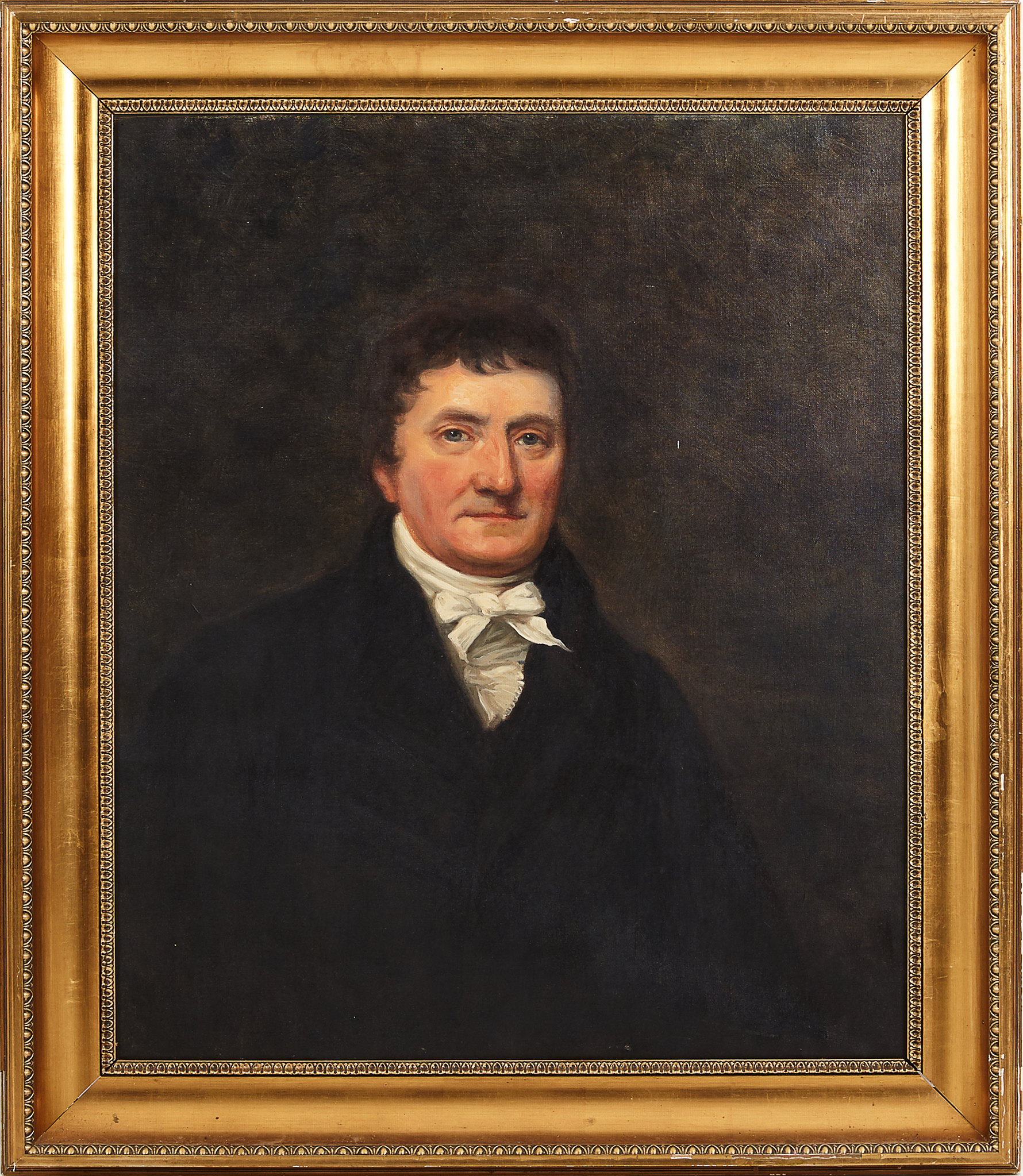 Porträtt av James Dickson (1748-1826) iförd svart kostym med vit skjorta och kravatt. Avporträtterad ca 1810 av okänd konstnär